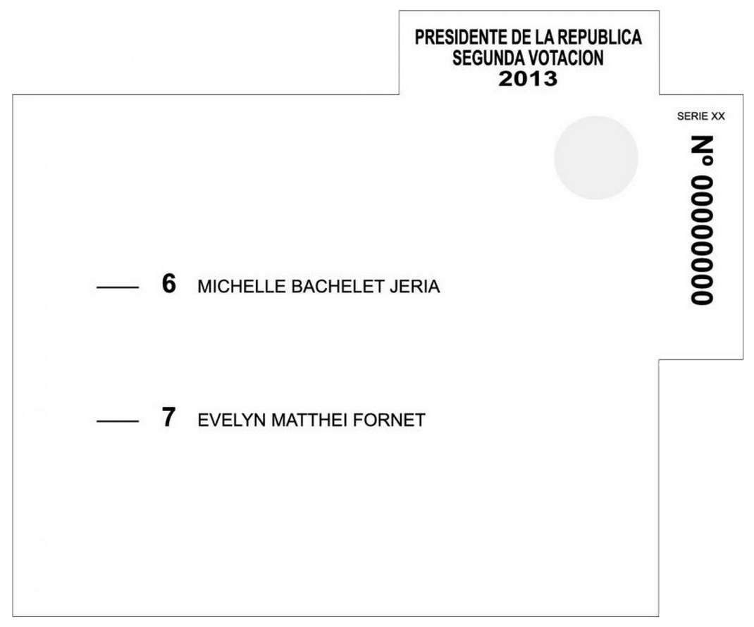 Reproducción de la cédula de votación utilizada en la segunda vuelta de la elección presidencial de Chile de 2013.